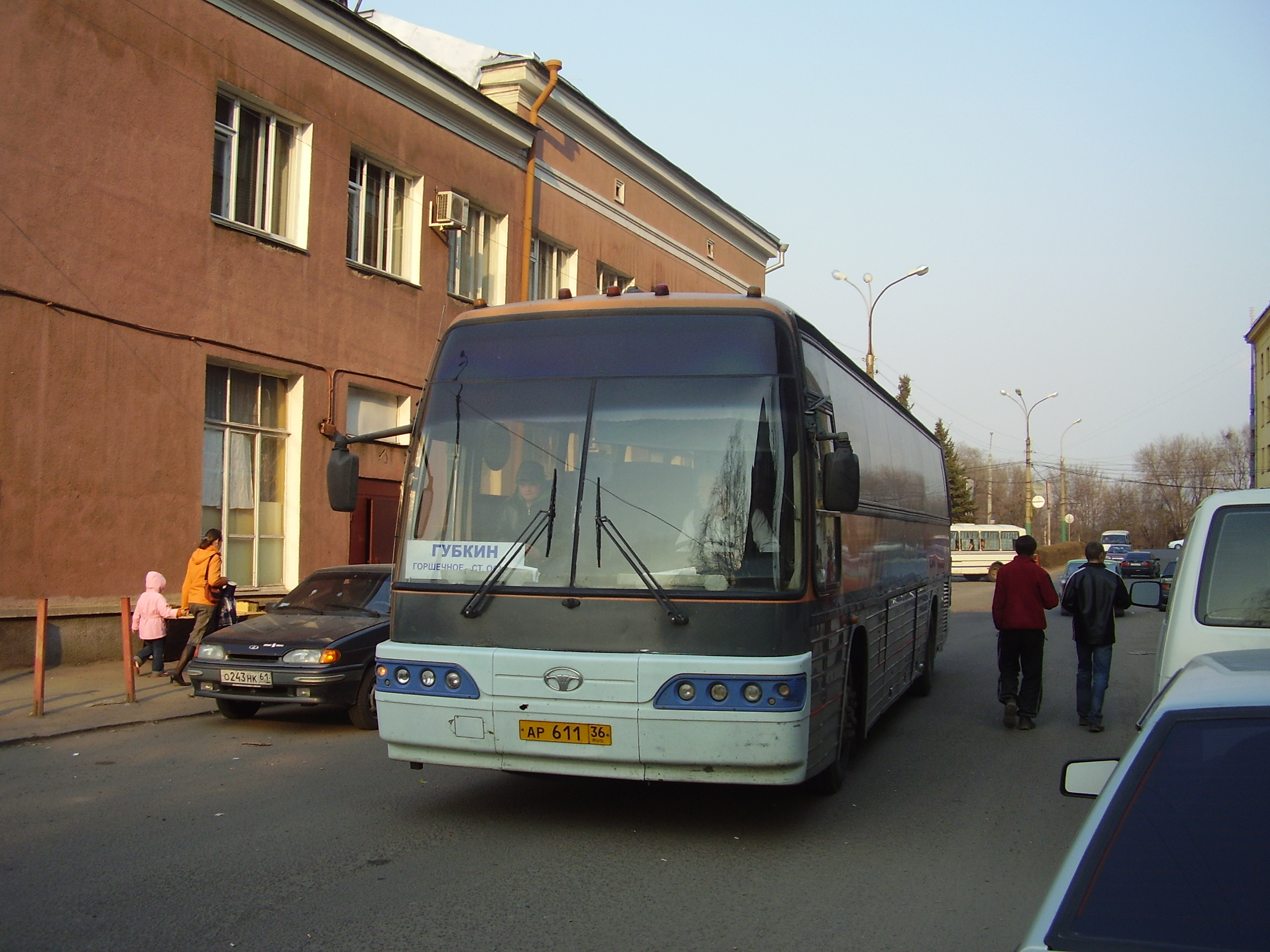 Междугородный автобус Daewoo - Bus Daewoo